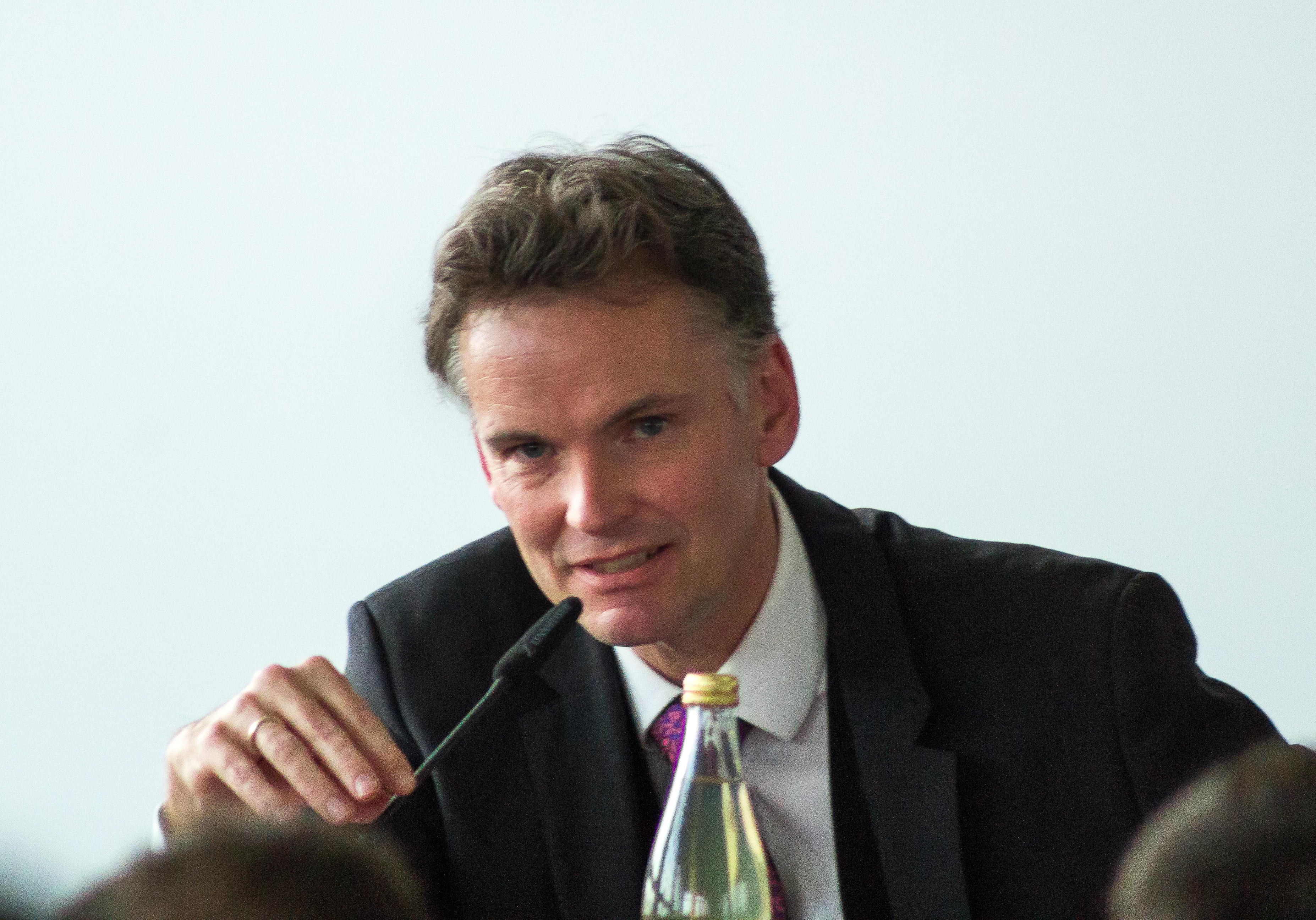 Gordian Meyer-Plath, Präsident des Landesamtes für Verfassungsschutz Sachsen, auf der Podiumsdiskussion "Die Grenzen des Geheimen" auf den Datenspuren 2015